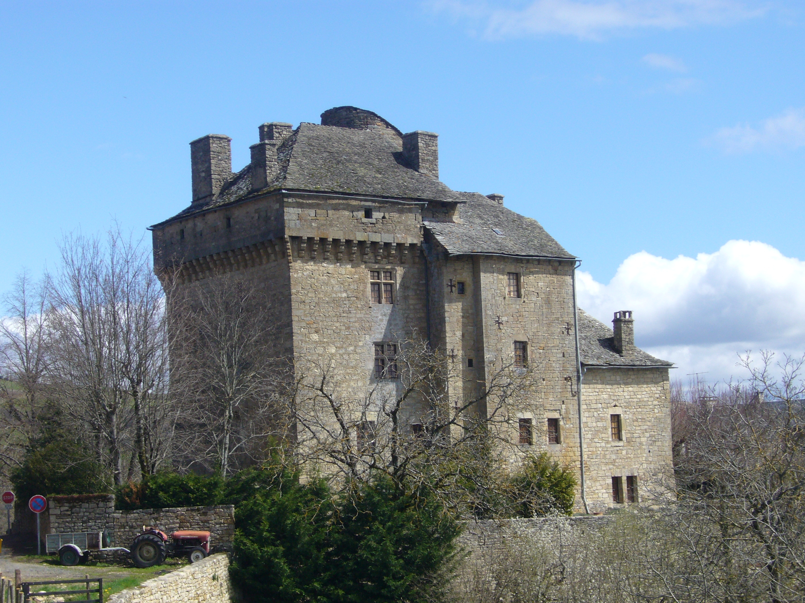 Le château de Monstjézieu (castrum Monte Juedo), commune de La Canourgue, Lozère